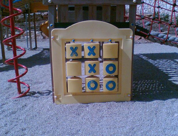 מתקן איקס עיגול בגן שעשועים. צילם דוד שי